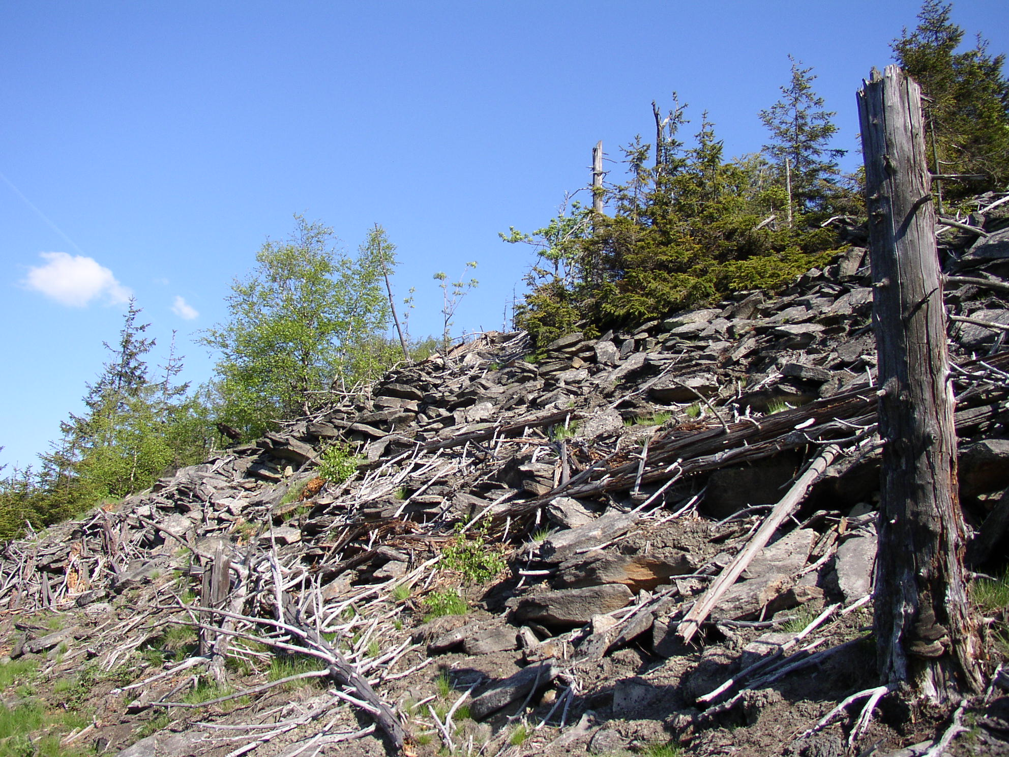 Kamenné moře na Jedlové